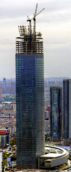 Forum 66, Shenyang, Oct2014